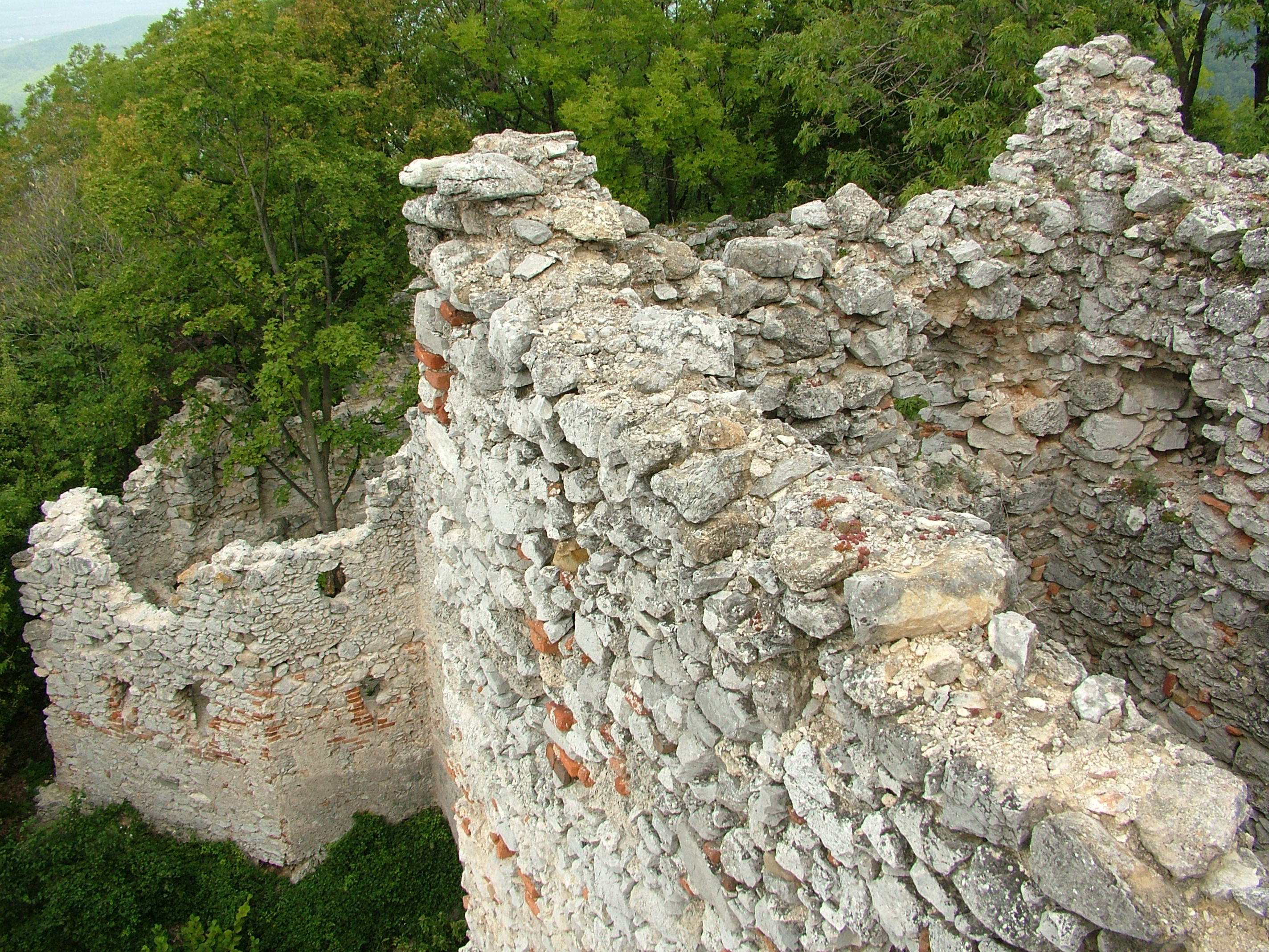 Hrad Tematín